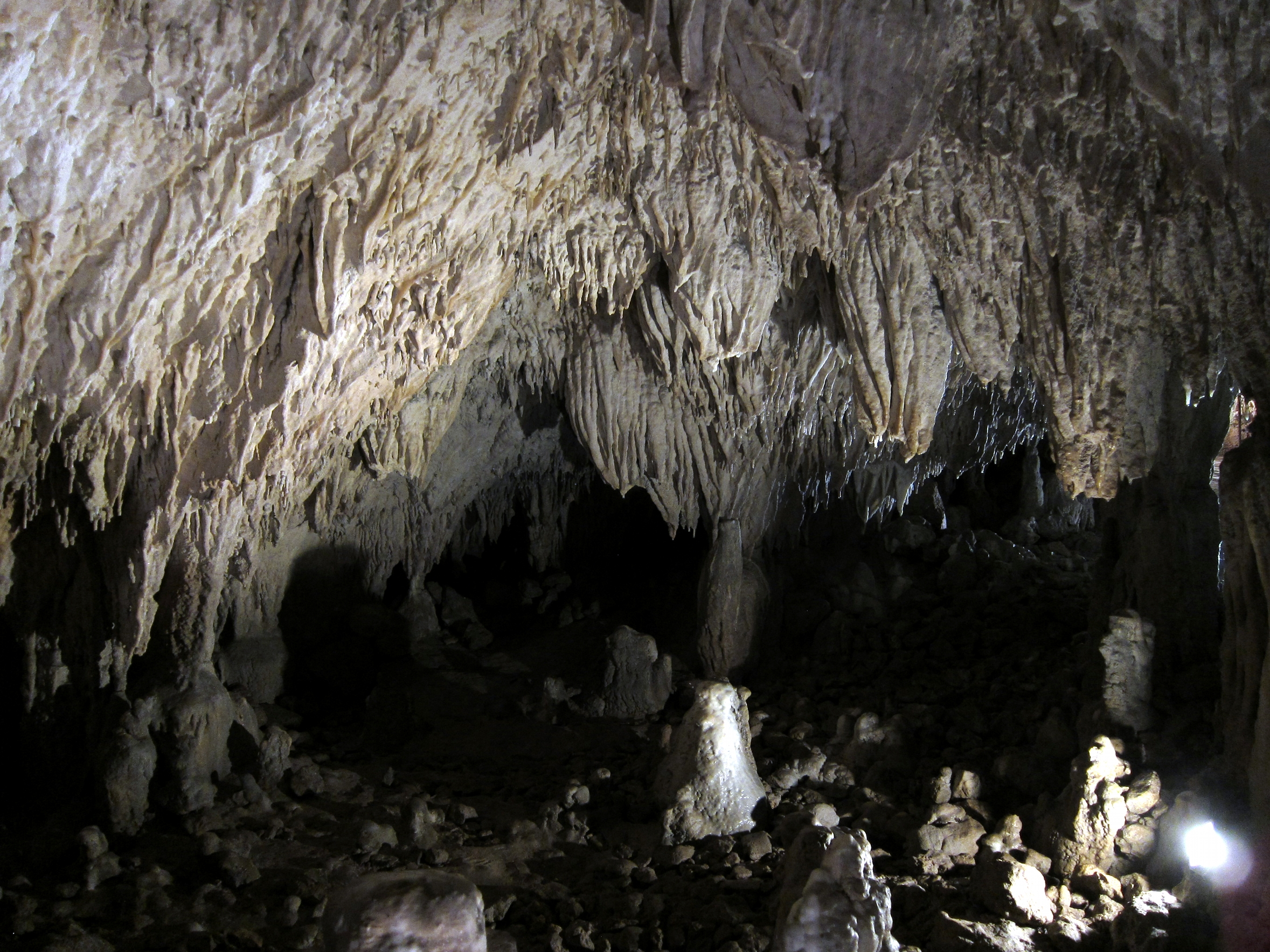 La première grotte du site de la Grotta del Romito.